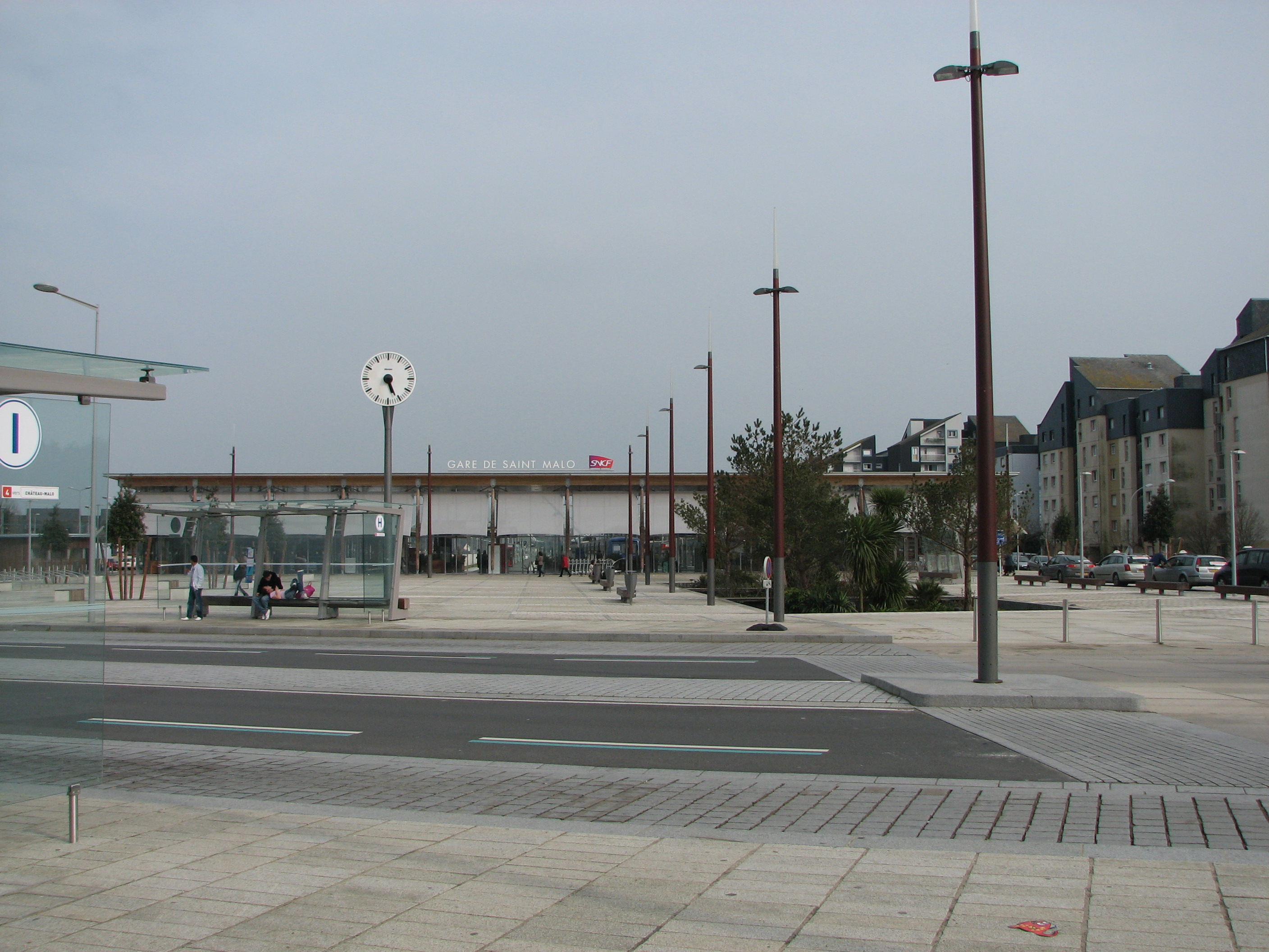 Nouvelle gare de Saint-Malo Saint-Malo new train station